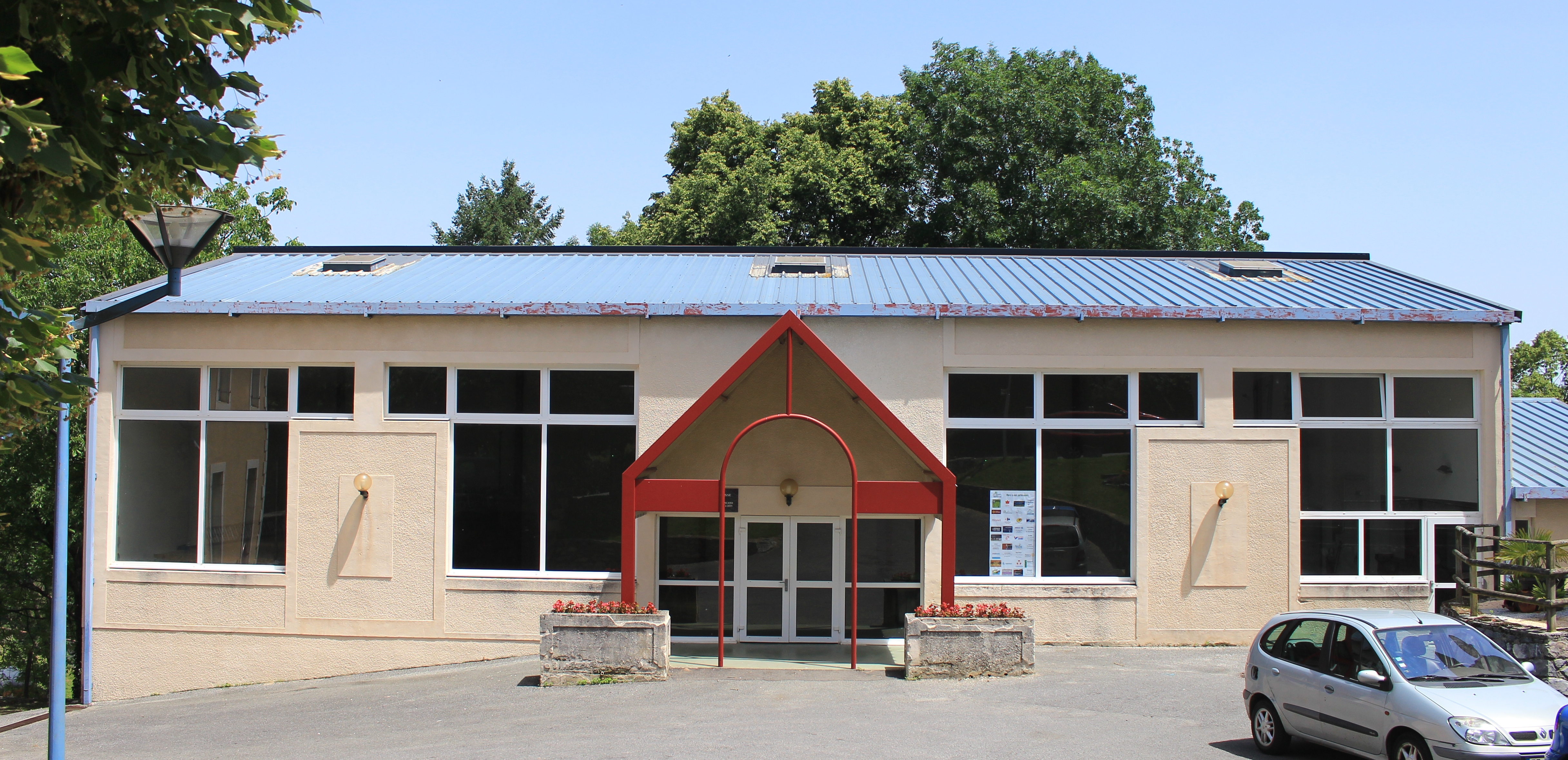 Salle des fêtes de Montoussé (Hautes-Pyrénées)